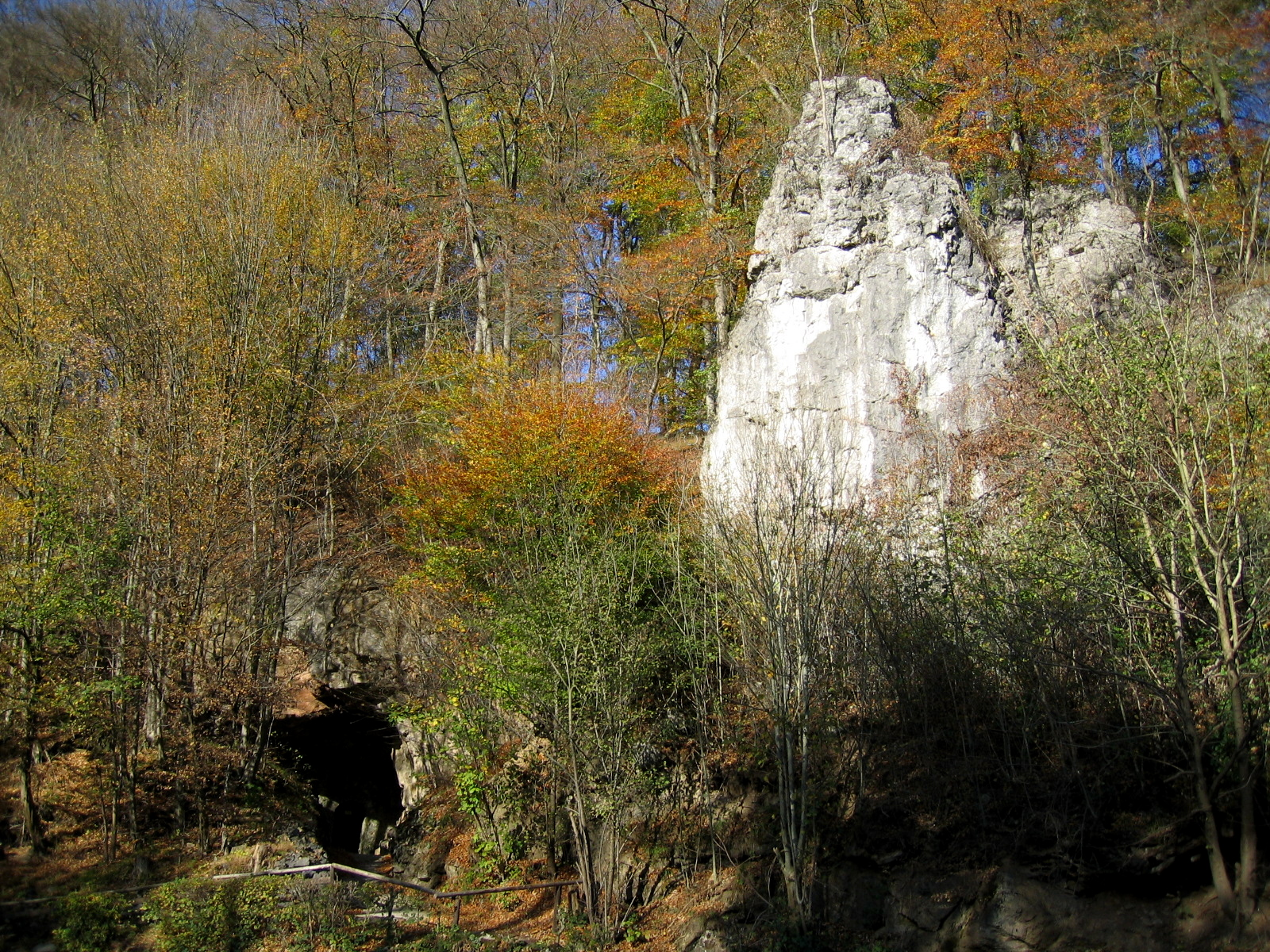 Ausgang der Reckenhöhle im Hönnetal, Balve